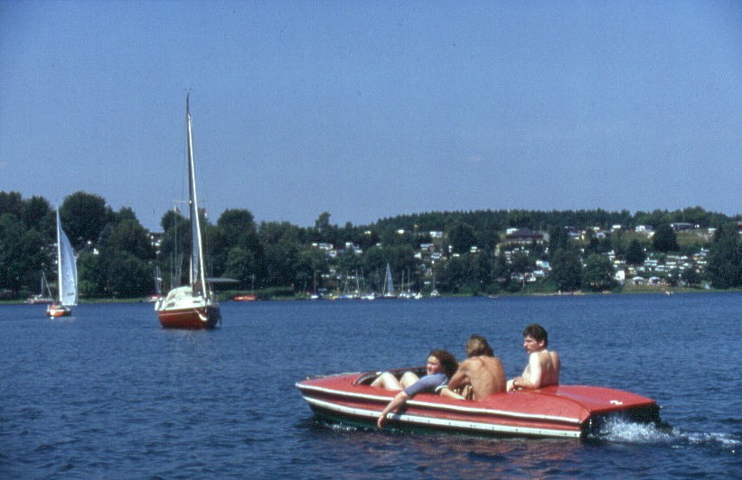 Bevertalsperre